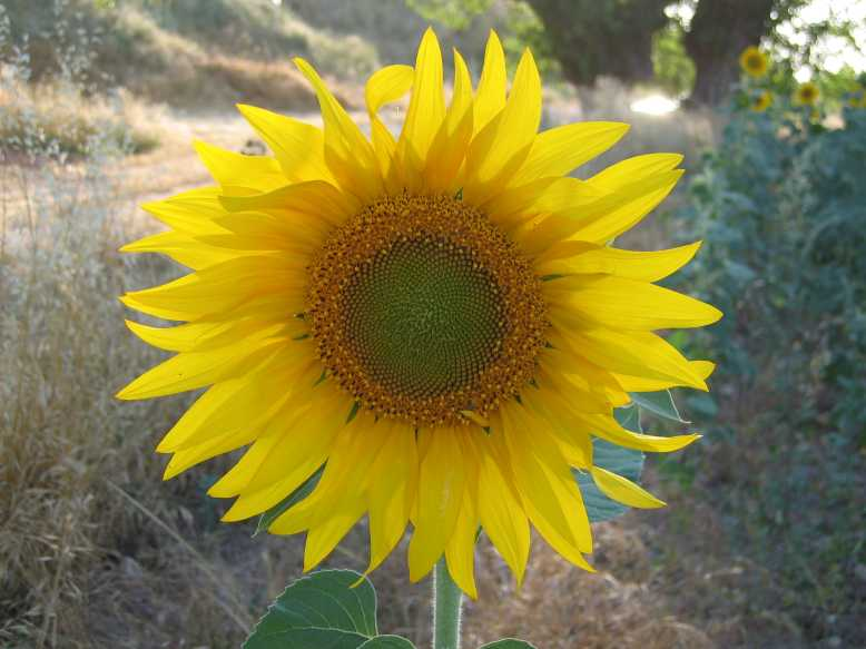 Un girasol Foto tomada cerca de la ermita de Villacisla, en Presencio